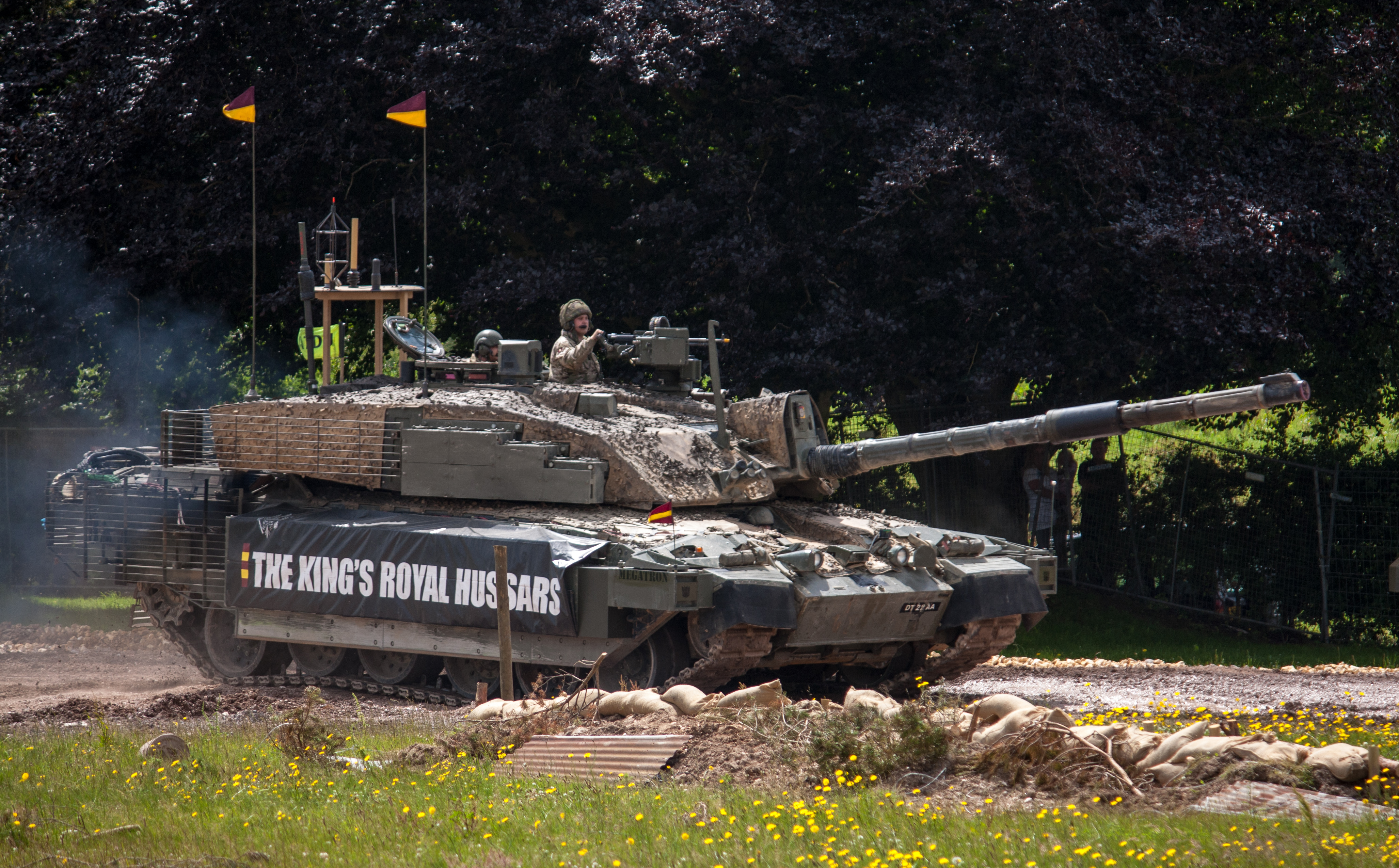 Challenger 2 FV4034 - 'Megatron'